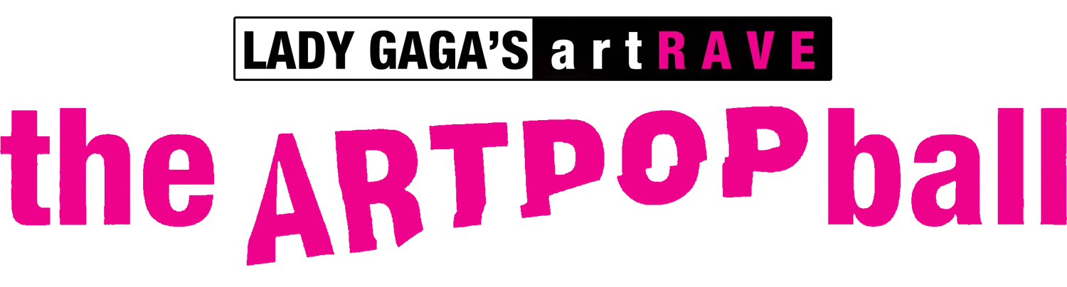 Logotipo del tour